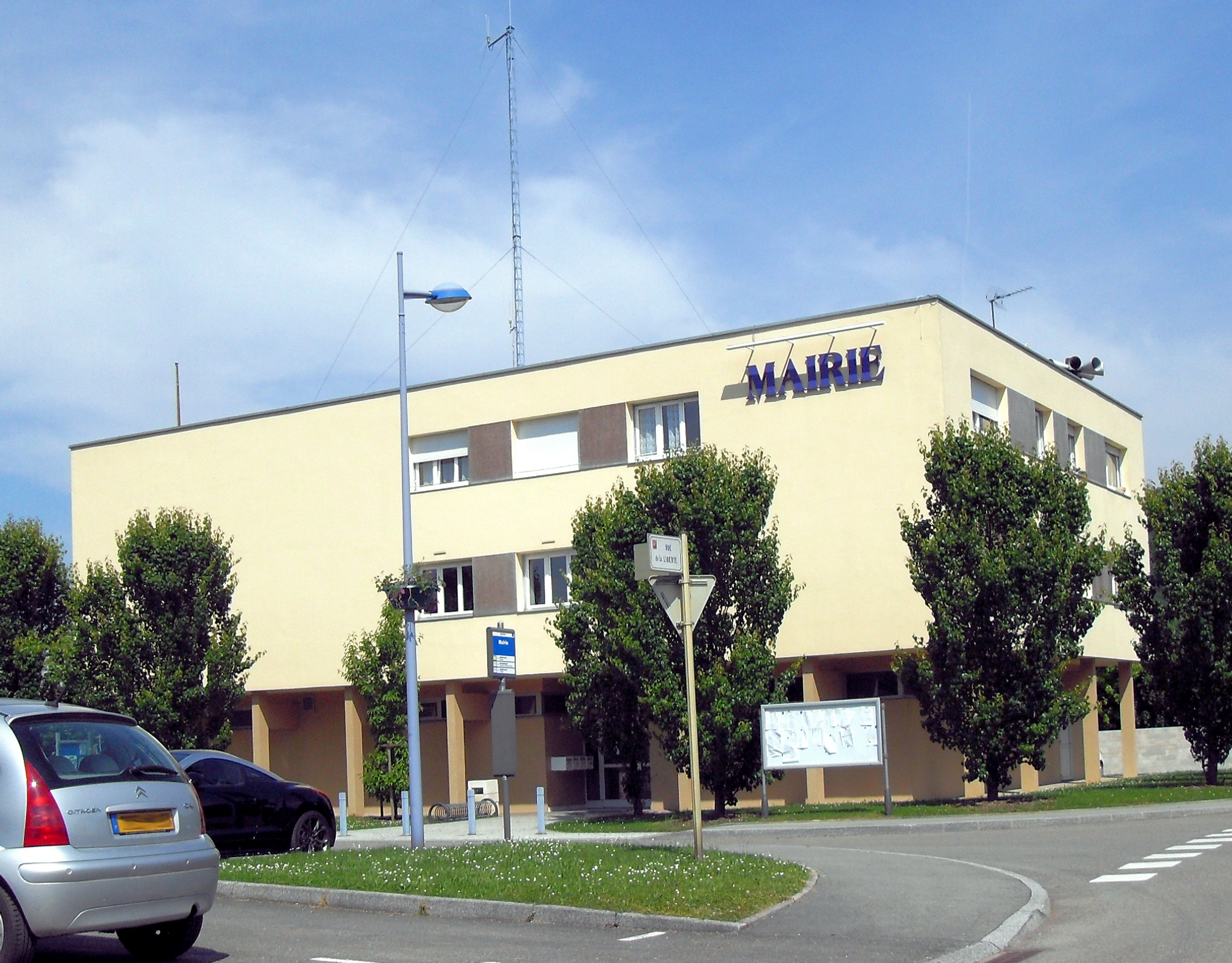 La mairie de Mathay